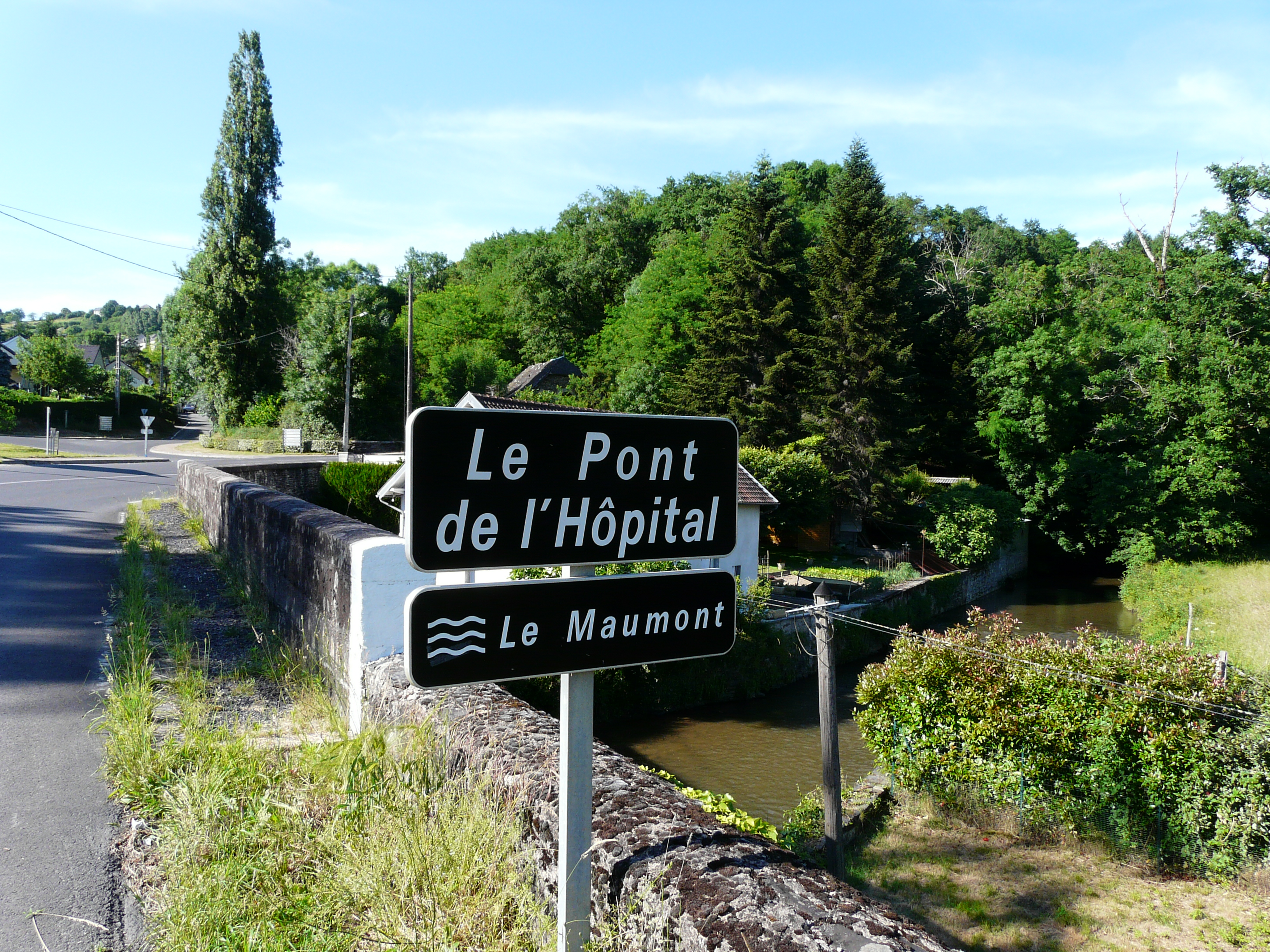 Le Maumont en amont du pont de l'Hôpital, Donzenac, Corrèze, France